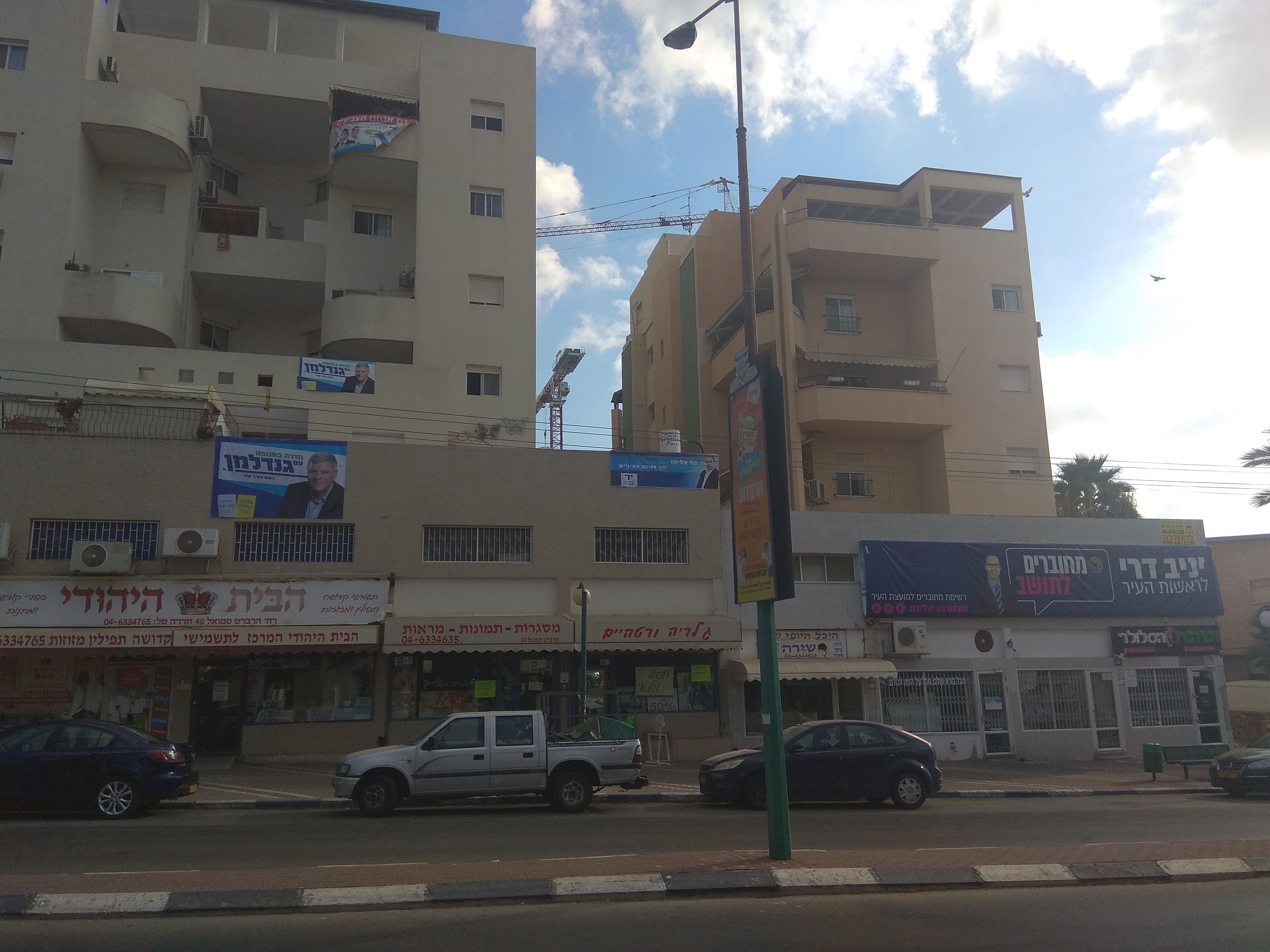 שלטי בחירות בעיר